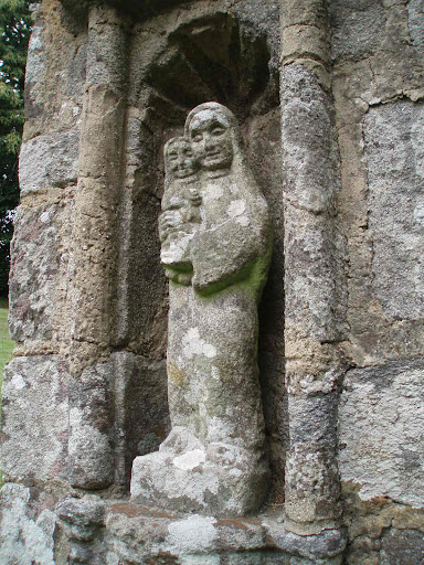 Sur le lieux des apparitions